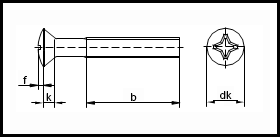 ISO 7047